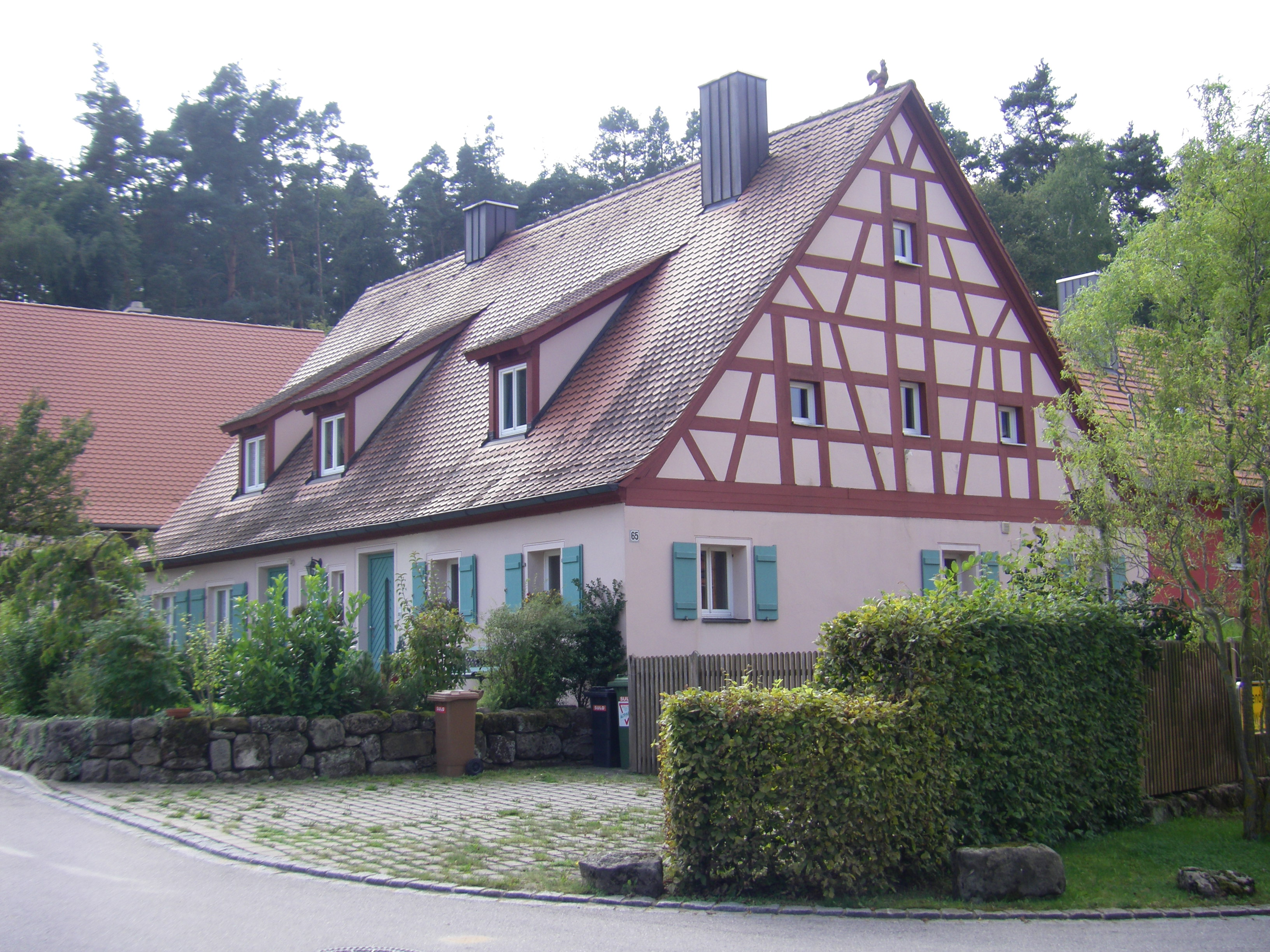 Baudenkmal;Wollersdorf 65; Neuendettelsau